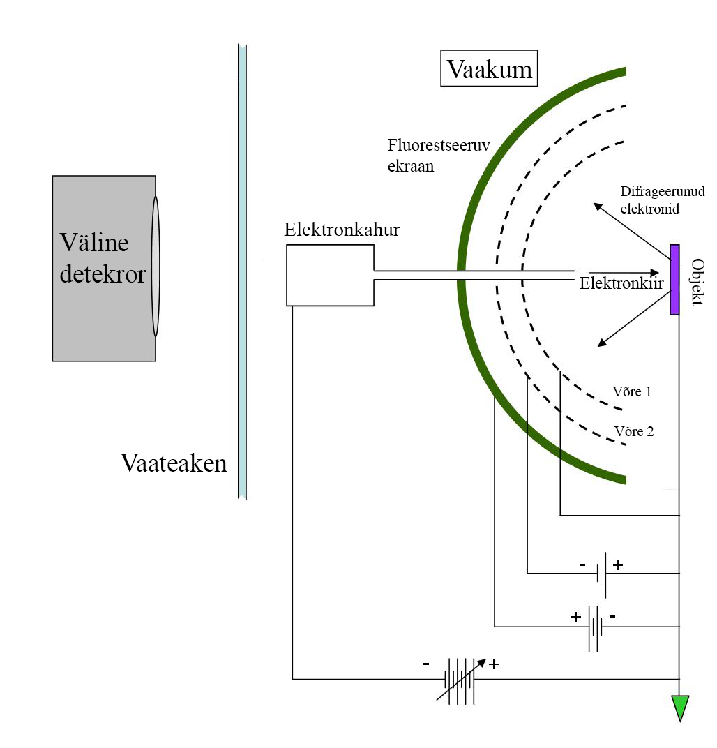 LEED Eksperimendi Diagramm